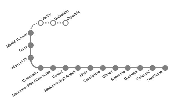 Filovia di Chieti